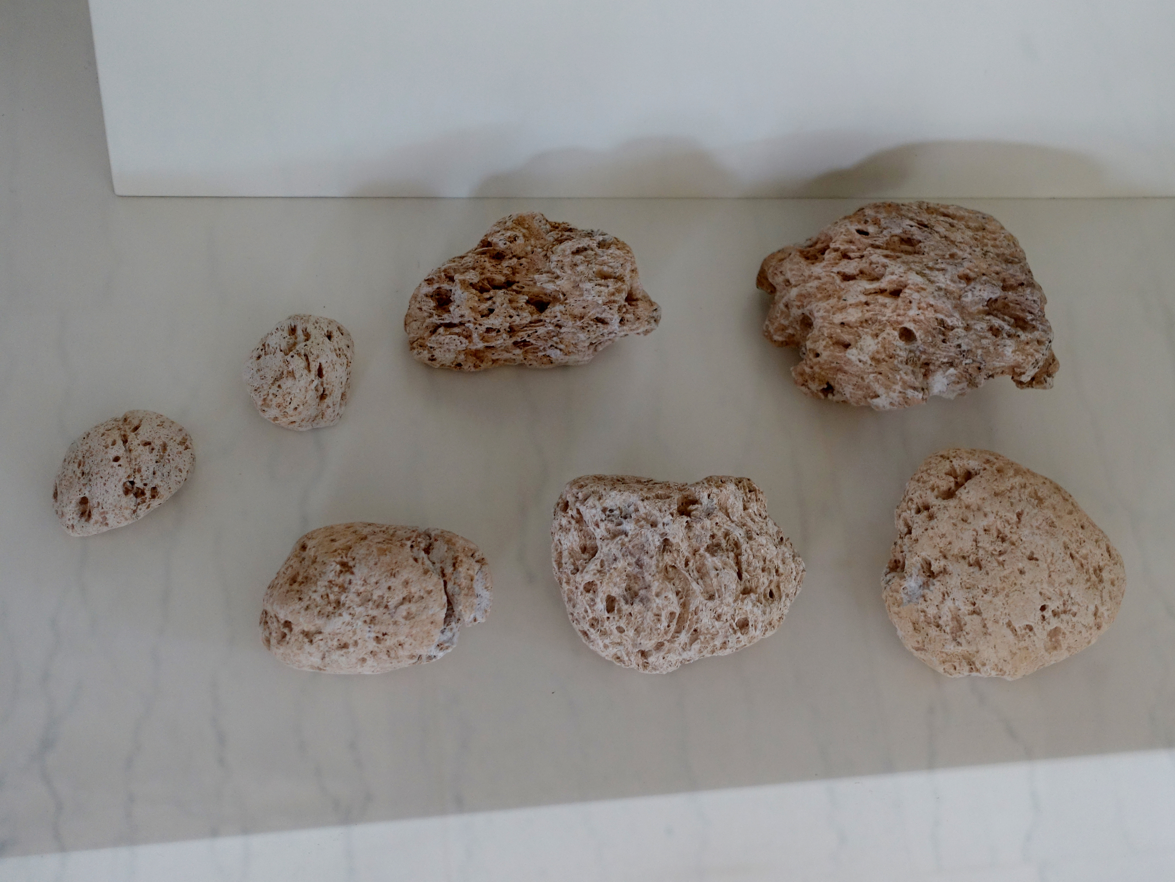 Bimsstein des Thera-Ausbruchs (Minoische Eruption) aus Papadiokambos westlich von Sitia, Archäologisches Museum von Sitia, Kreta, Griechenland